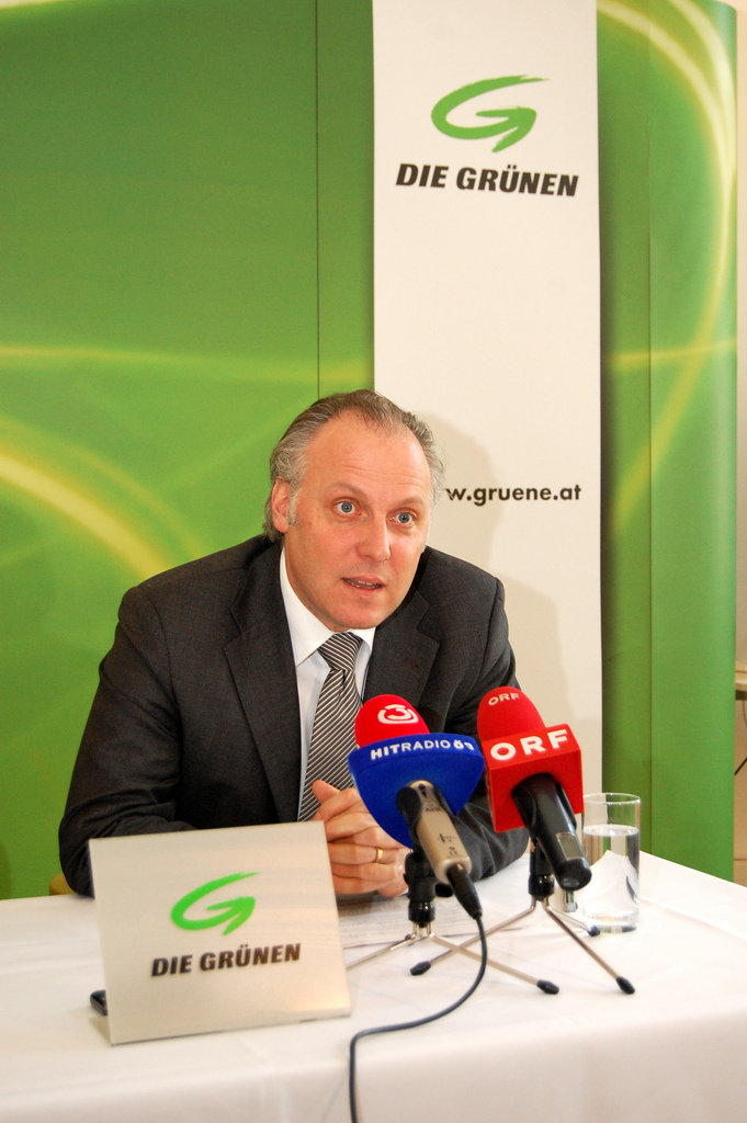 Bundesgeschäftsführer der Grünen Stefan Wallner